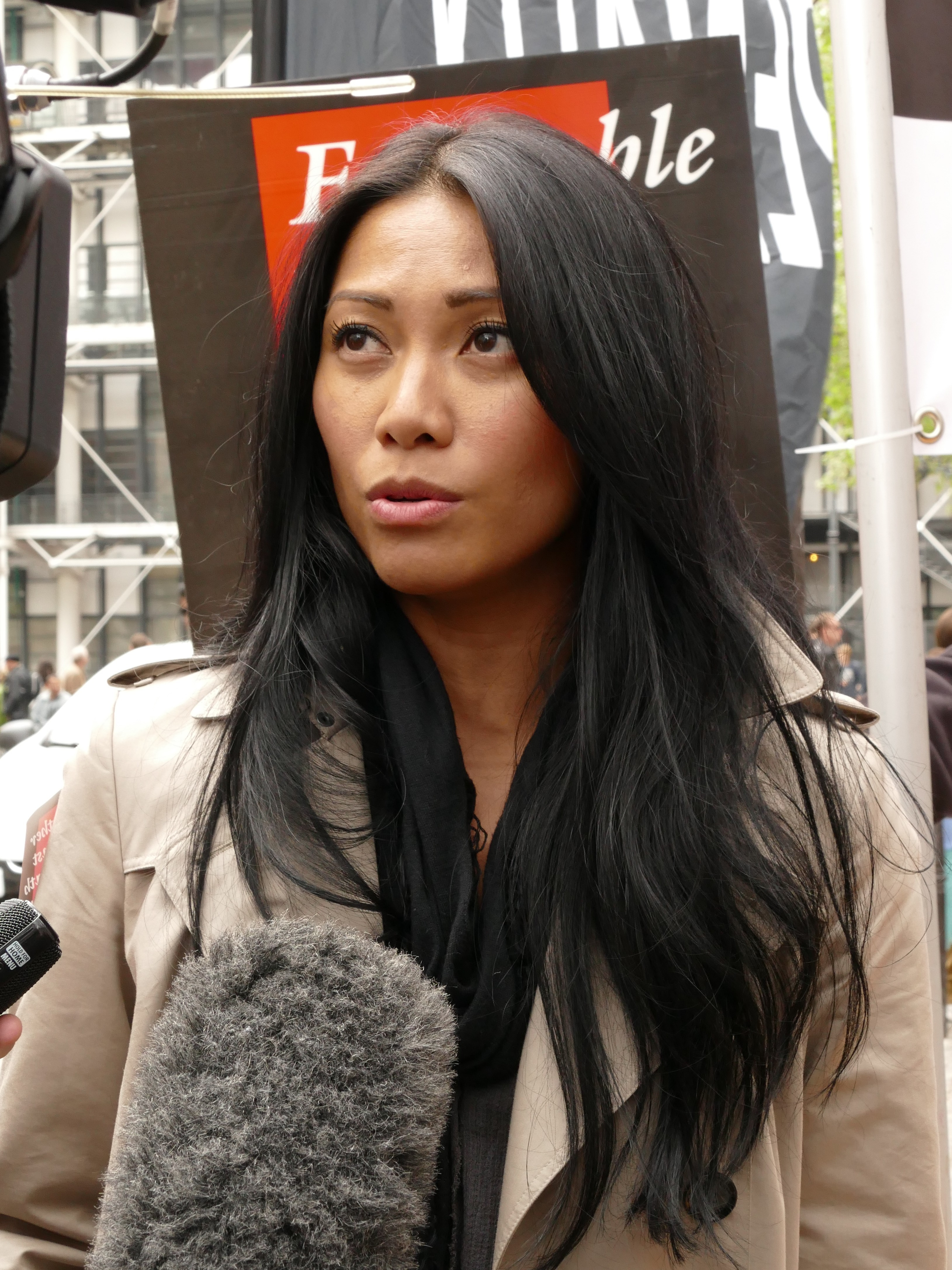 Manifestation de soutien à Serge Atlaoui et contre la peine de mort, le 25 avril 2015 sur la place Edmond-Michelet (Paris, 4e arrond.). La chanteuse Anggun se mobilise pour cette cause.